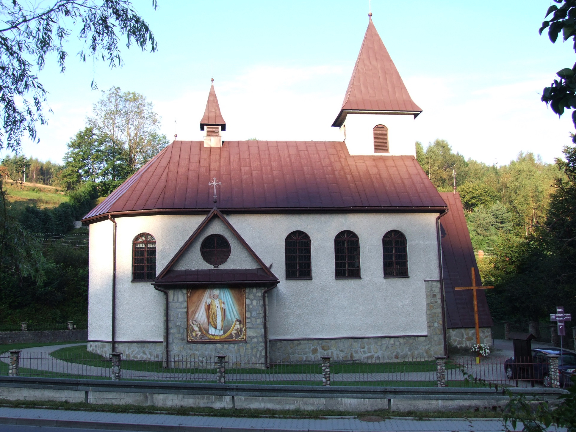 Kościół w Bielance